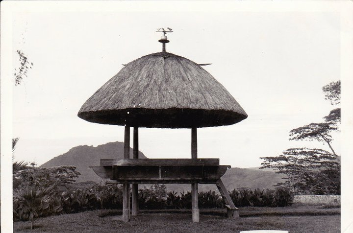 Casa chamada "laco": é uma casa para reunião das famílias que fazem parte de uma casa Lulic(sagrada) e também para receberem hospedes, etc.